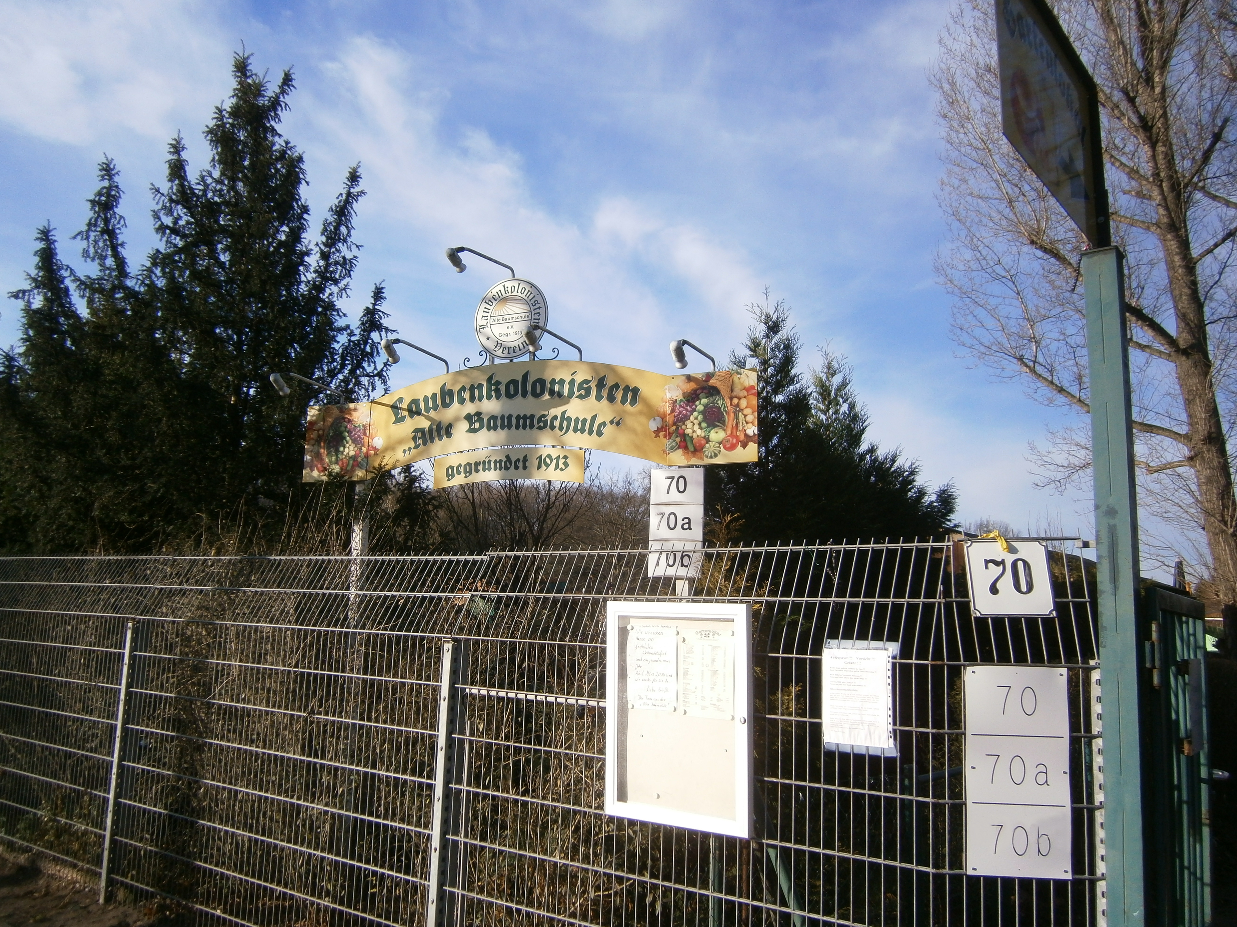 Hermann-Hesse-Straße ist eine Straße in Berlin-Niederschönhausen. Hier der Blick der KGA Alte Baumschule an der Ecke (vormals) Friesenstraße.